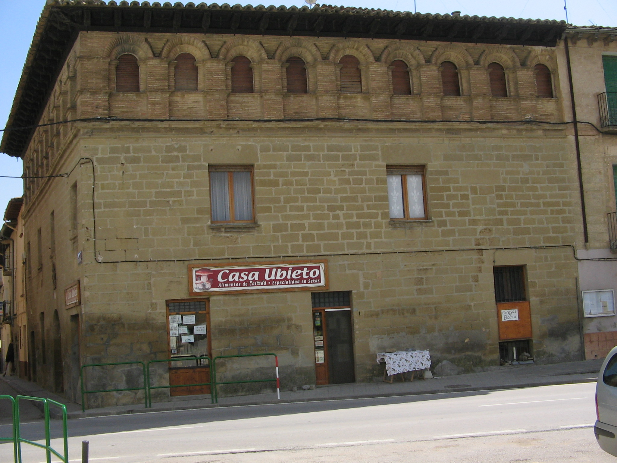 Junio-2006 El Palacio de los Luna es una buena muestra de arquitectura doméstica aragonesa. Tiene escudo. Su fábrica es de sillares y las fachadas están rematadas con la típica galería de arquillos de ladrillo, que aquí son aplantillados. El tejado vuela sobre alero de madera